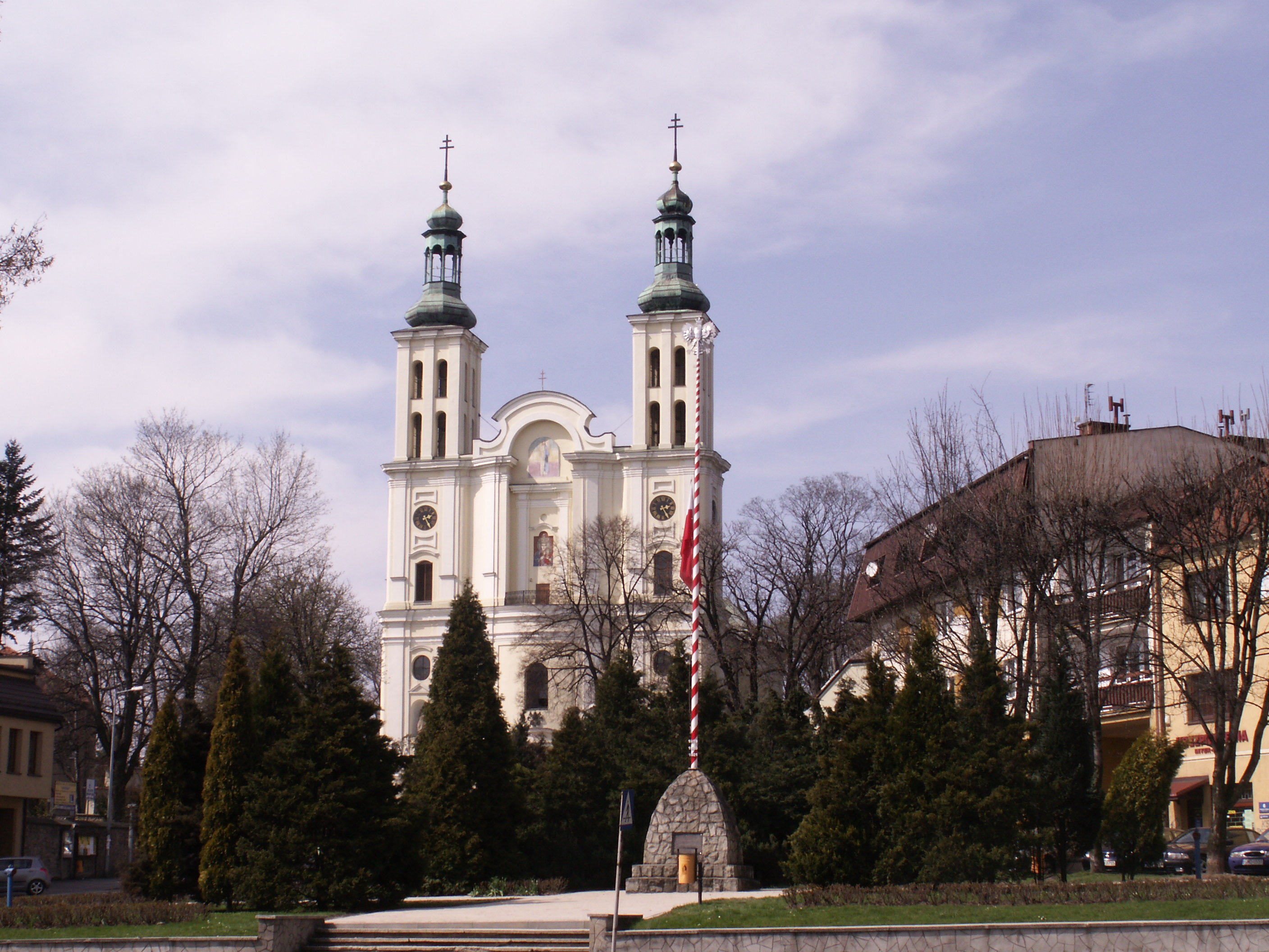 Kościół parafialny, bazylika p. w. Narodzenia NMP w Pszowie. Widok z kierunku ulicy Romualda Traugutta.